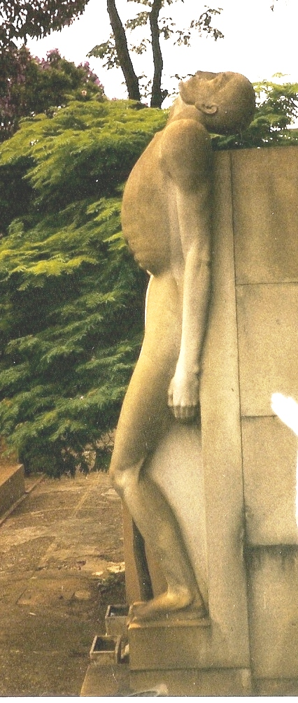 Túmulo de Luís Ísola, por Nicola Rollo, cemitério da Consolação.